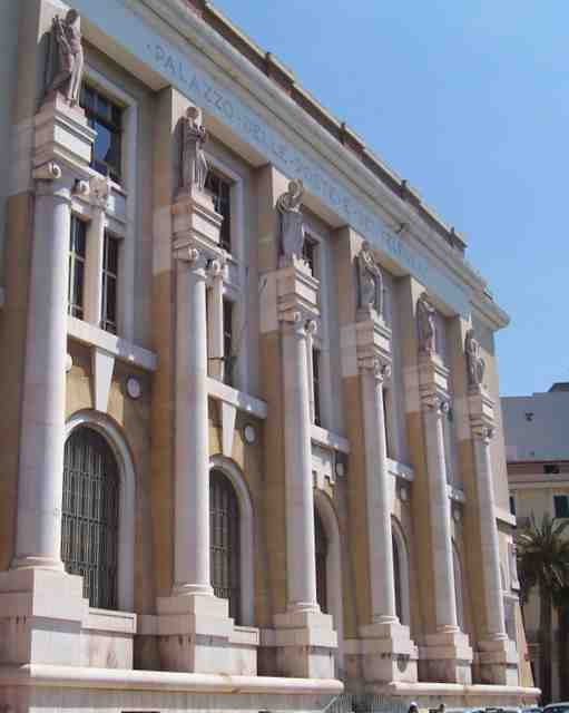 Post office (Taranto) Progettato da Cesare Bazzani e costruito nel 1937.